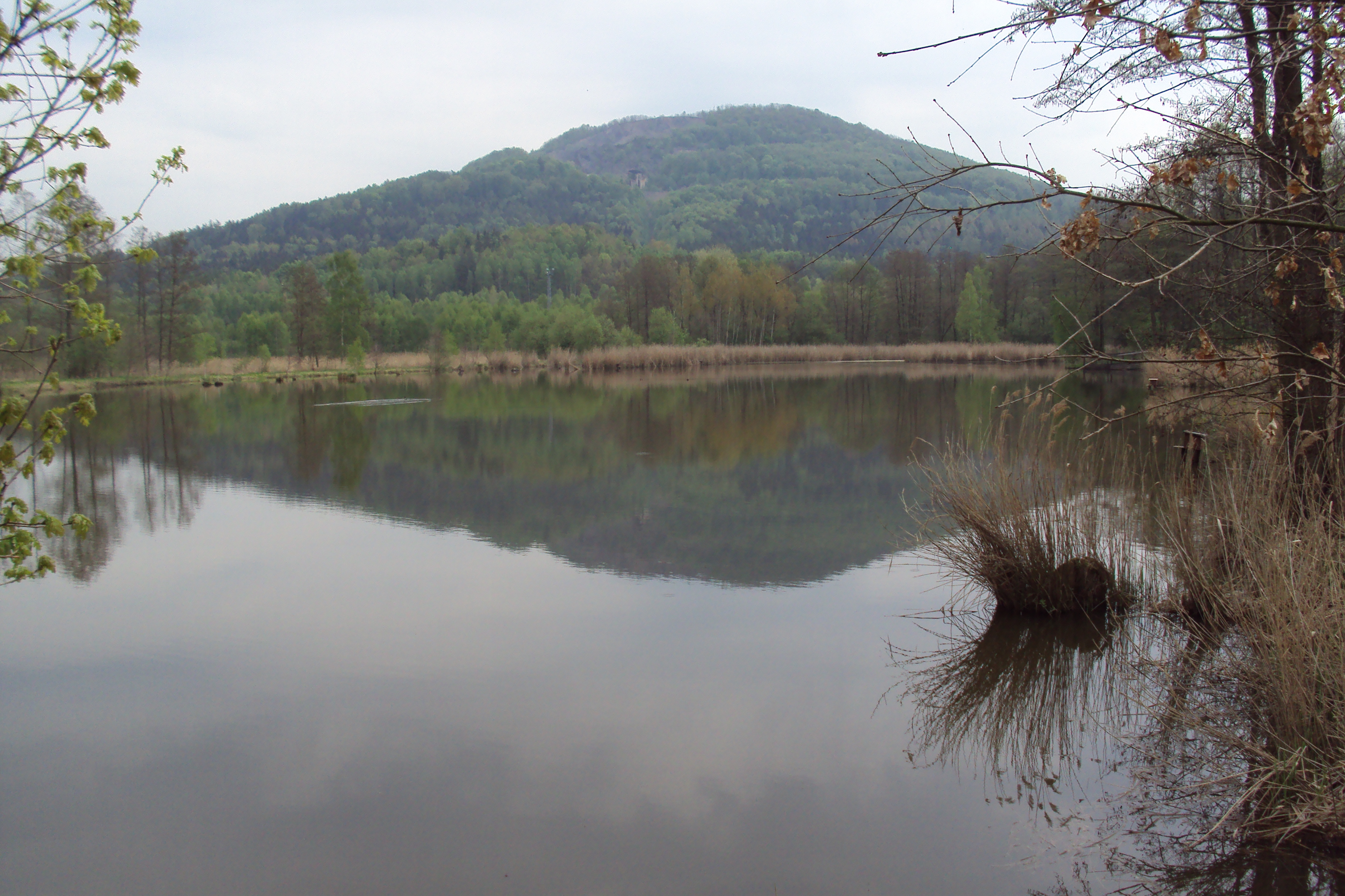 Rybník je poblíž želez.zastávky Brniště, na katastru Hlemýždí u Brniště, v pozadí kopec Tlustec